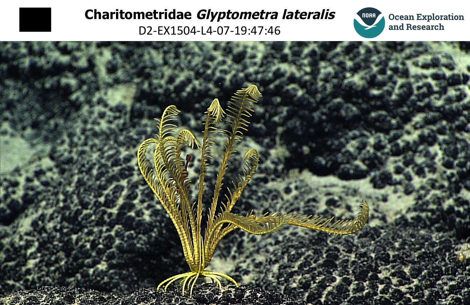 Une comatule Glyptometra lateralis observée dans les abysses par la mission Okeanos Explorer.